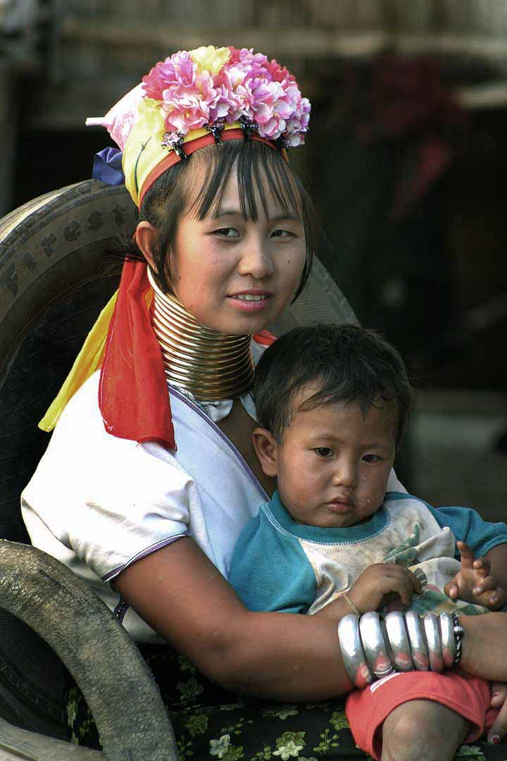 Ragazza tailandese con bambino in braccio